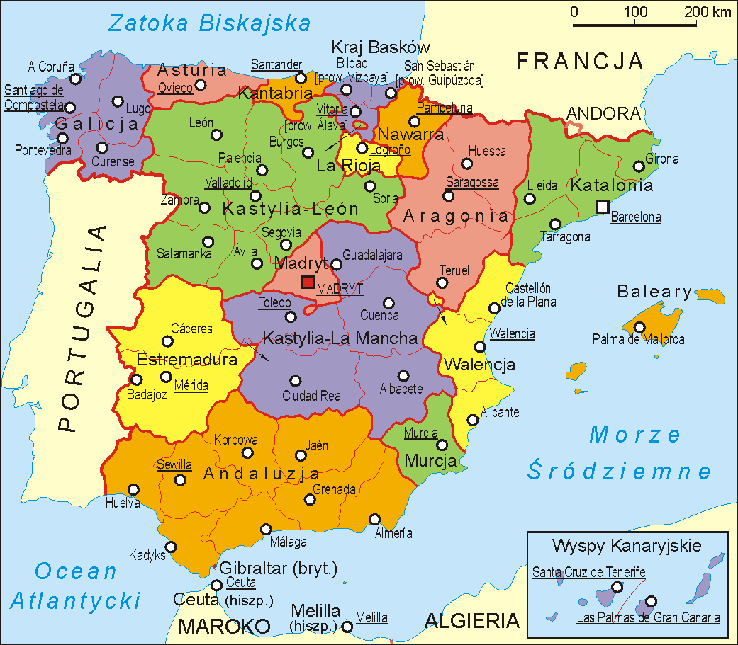 Mapa administracyjna Hiszpanii z podziałem na regiony i prowincje. Autor Aotearoa